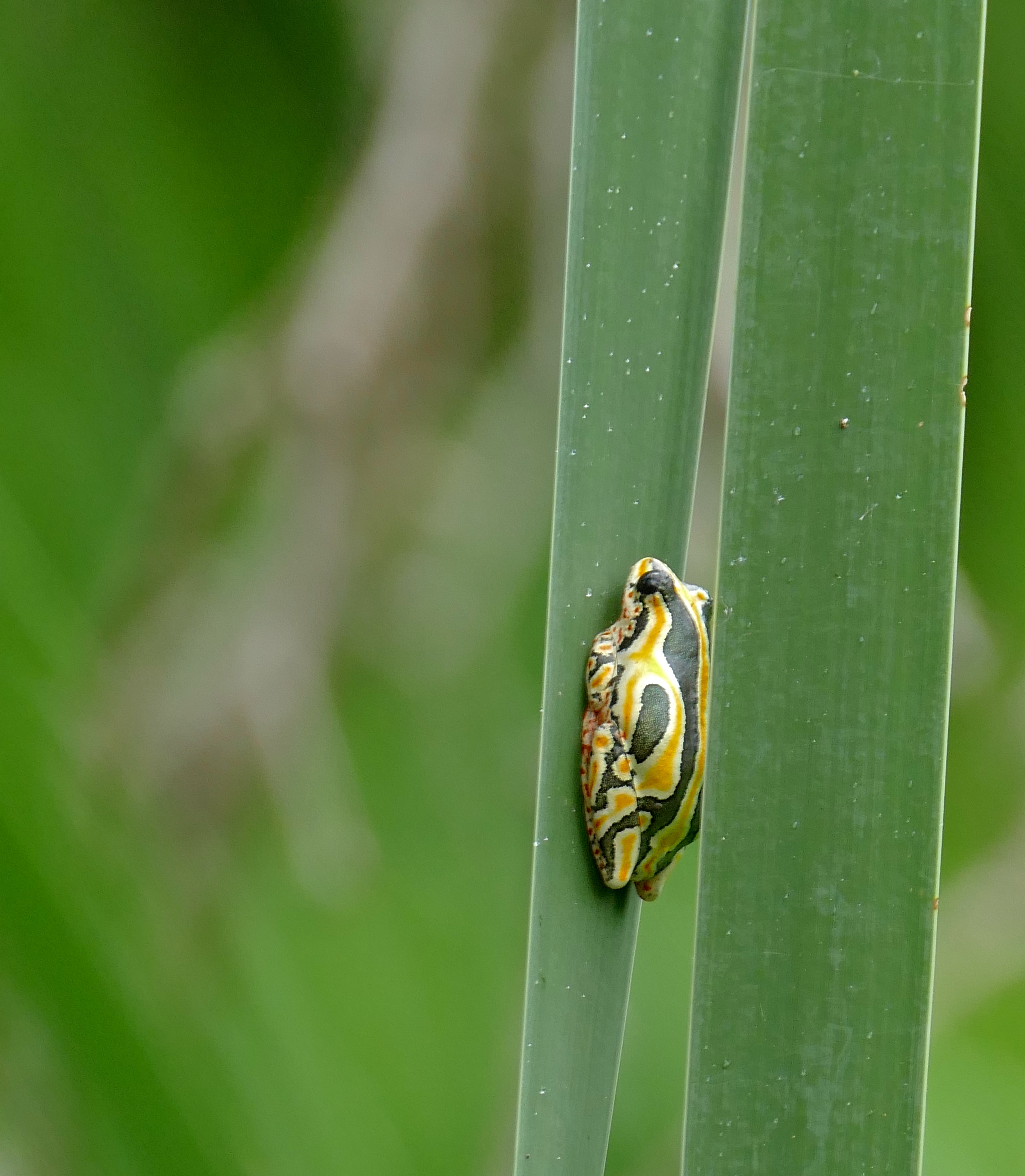 Skukuza Nursery Boardwalk, Skukuza, Kruger NP, SOUTH AFRICA